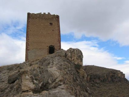 Catell datat del segle XIV